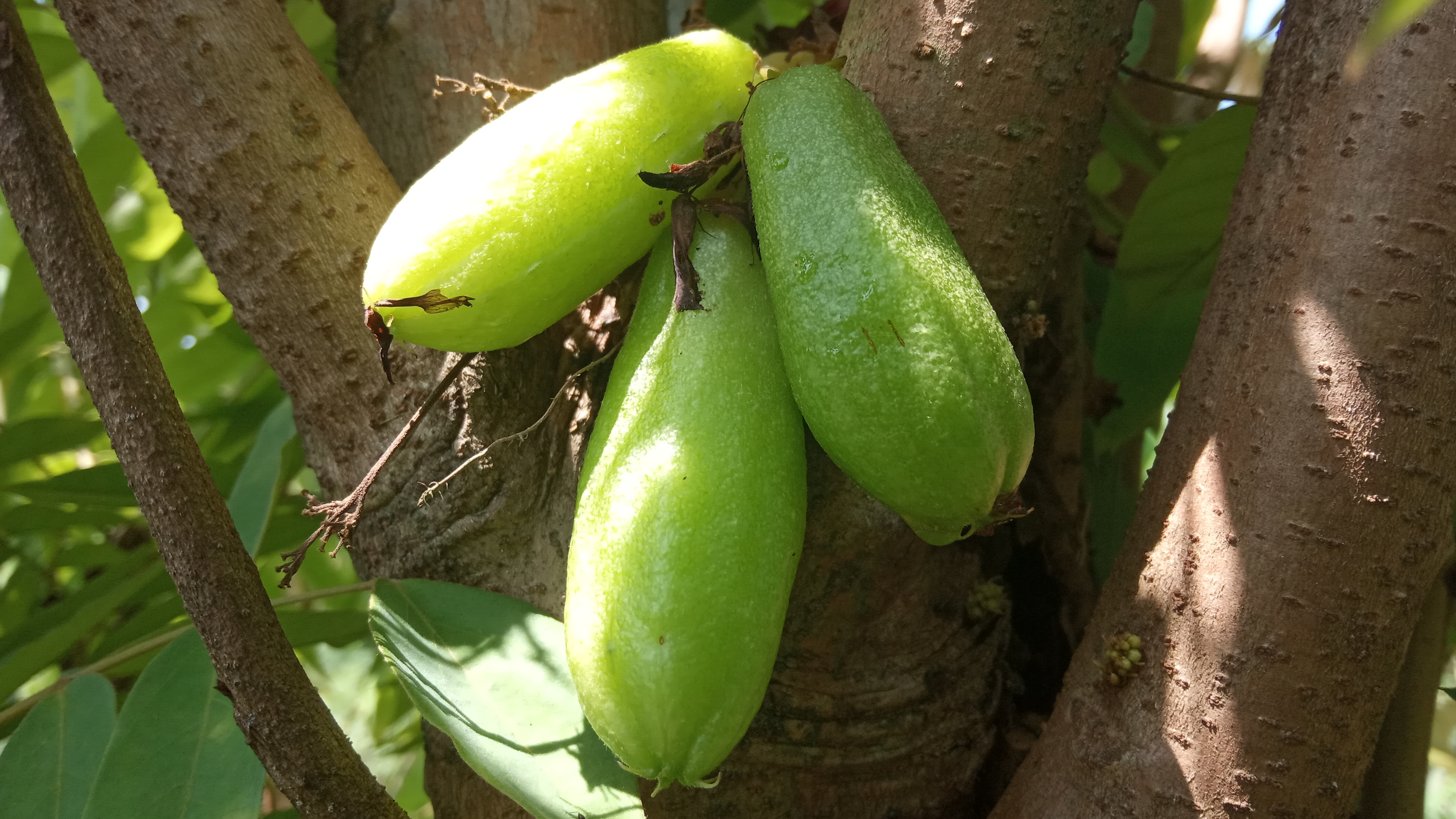 SetiawanAP-BelimbingWuluh